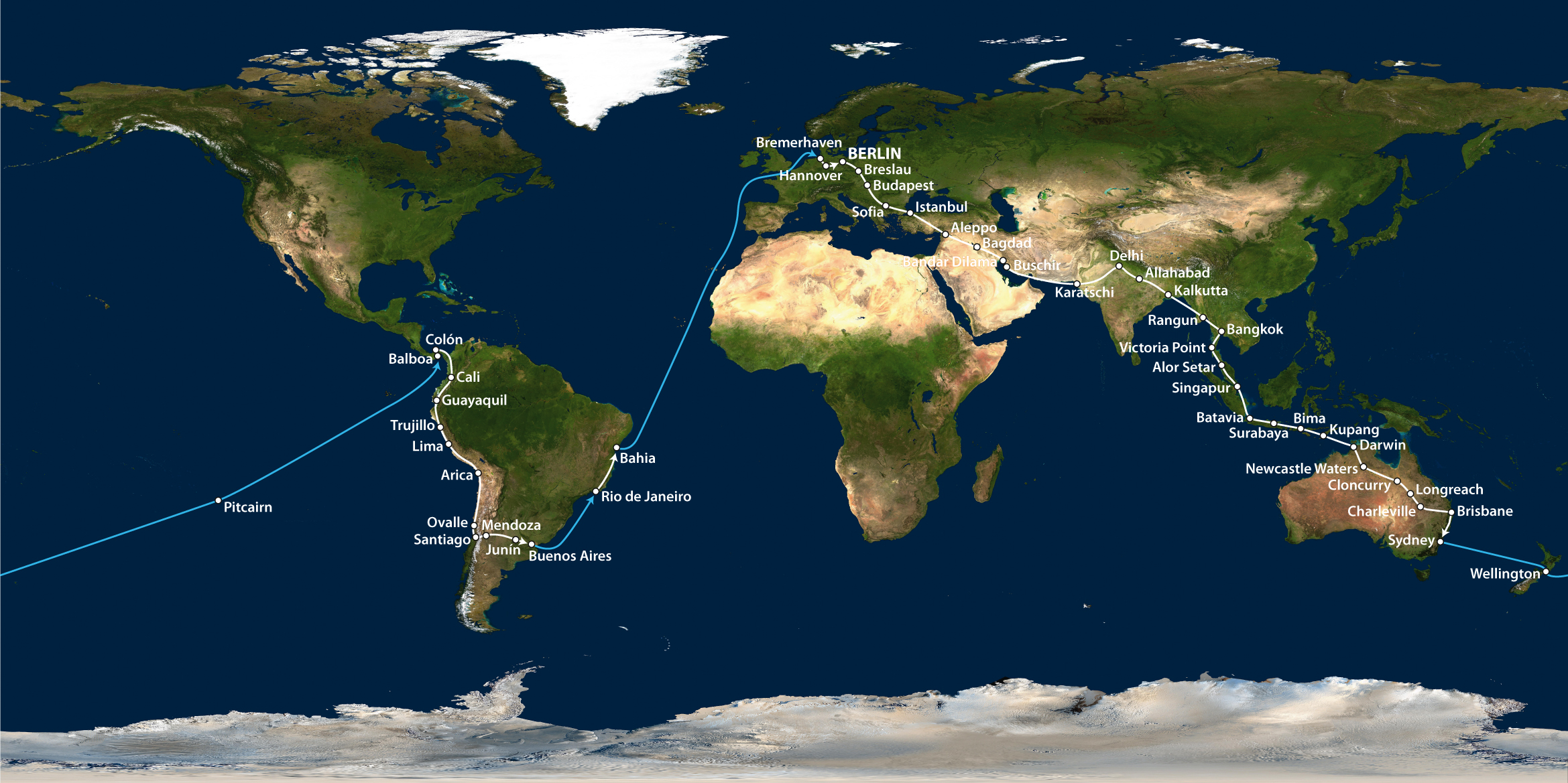 Stationen der Weltumrundung von Elly Beinhorn im Jahr 1932; weiß: Flug, blau: Schiffsreise